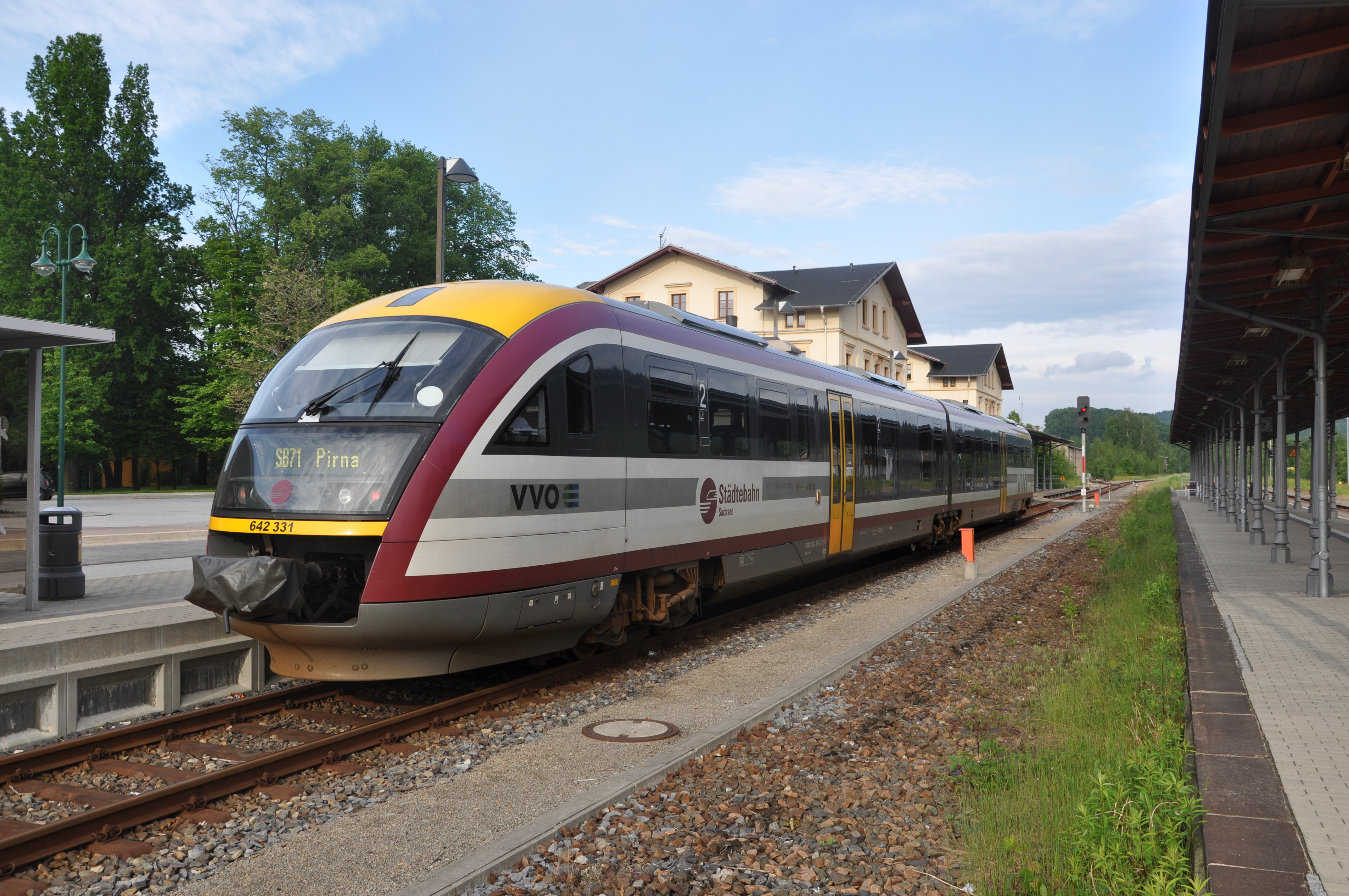 Bahnhof Neustadt (Sachs) mit Zug der Städtebahn Sachsen